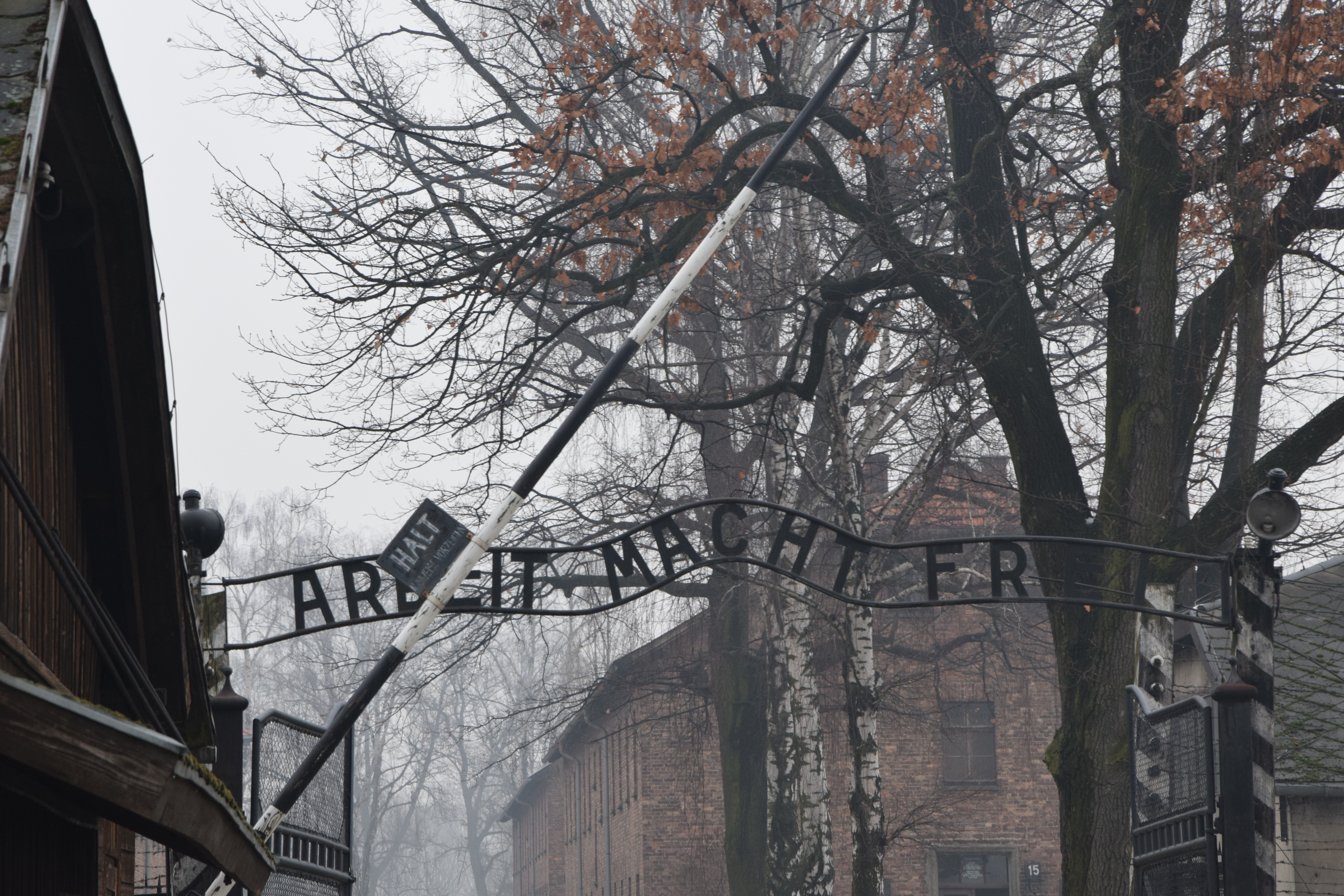 scritta "Arbeit macht frei"